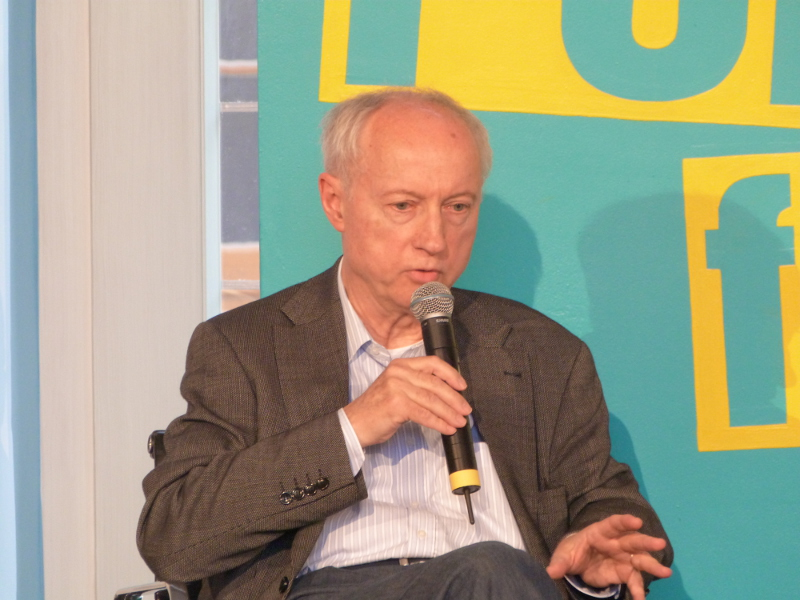 German writer Friedrich Dieckmann during an interview at the Erlanger Poetenfest 2012